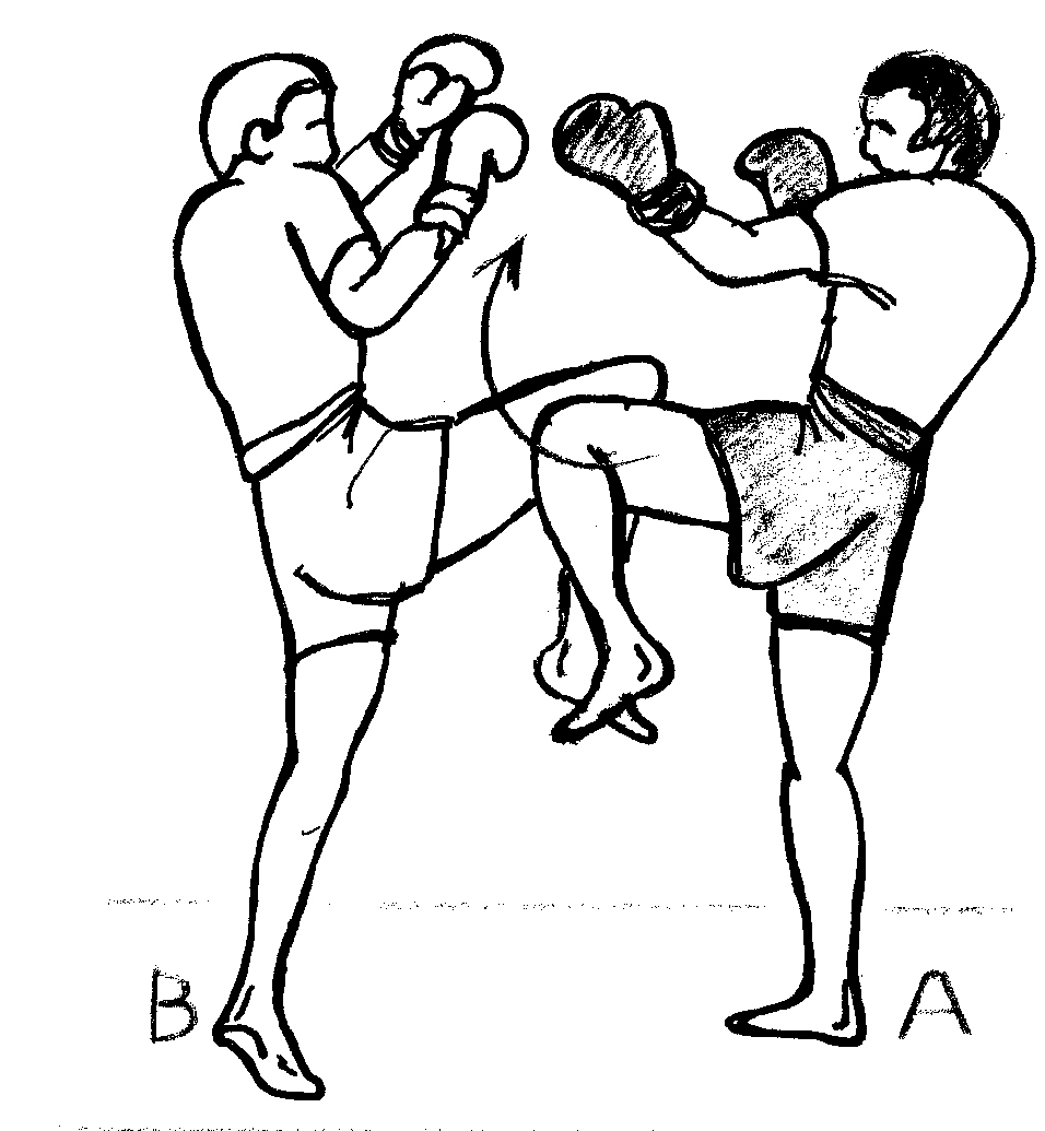 devie_genou.jpg